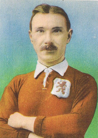 Bok de Korver (1883-1957), voormalig Nederlands international